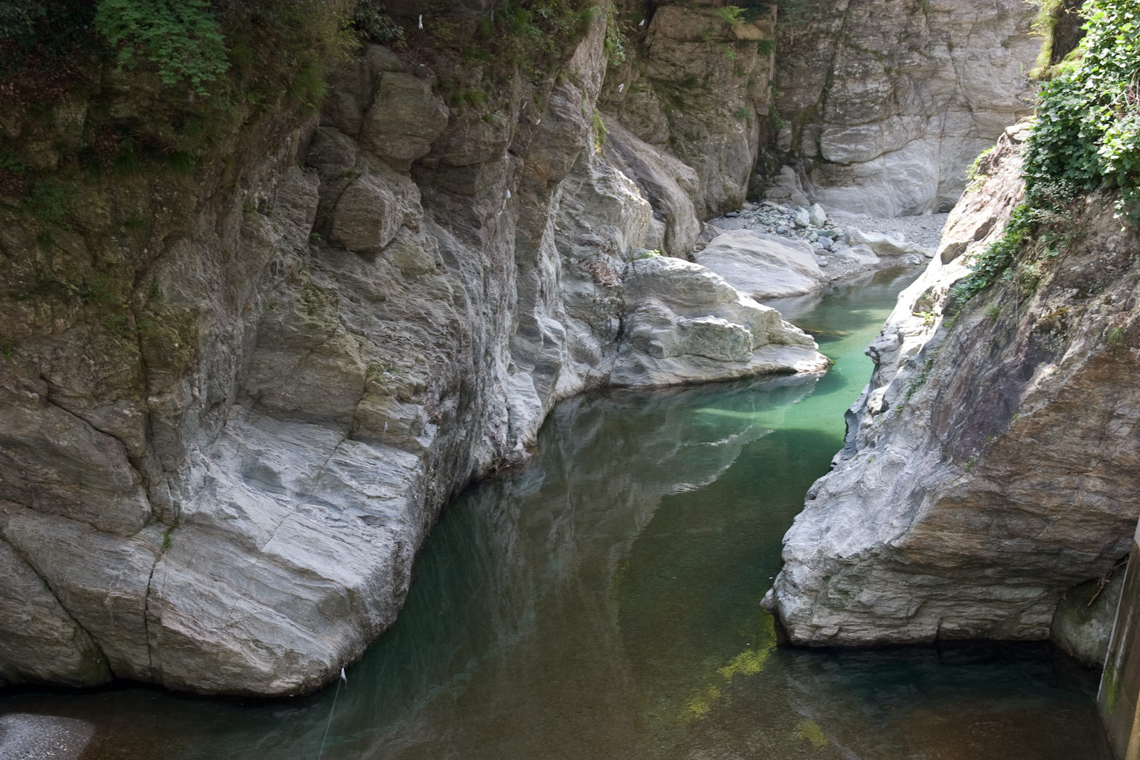 徳島県美馬郡つるぎ町にある一宇渓